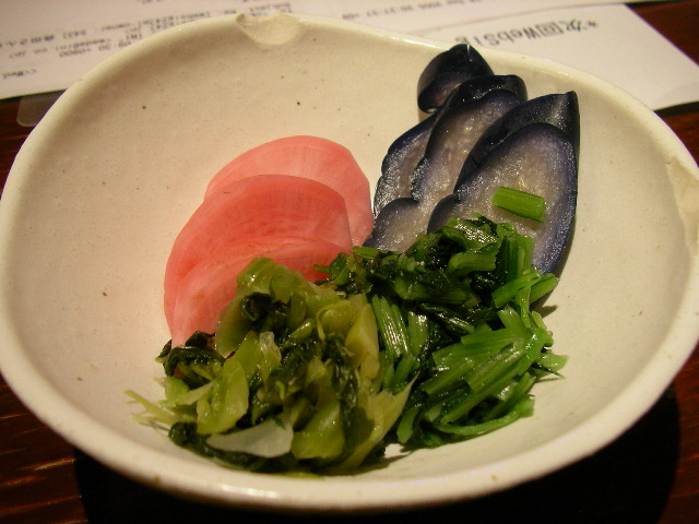 Tsukemono-annos.